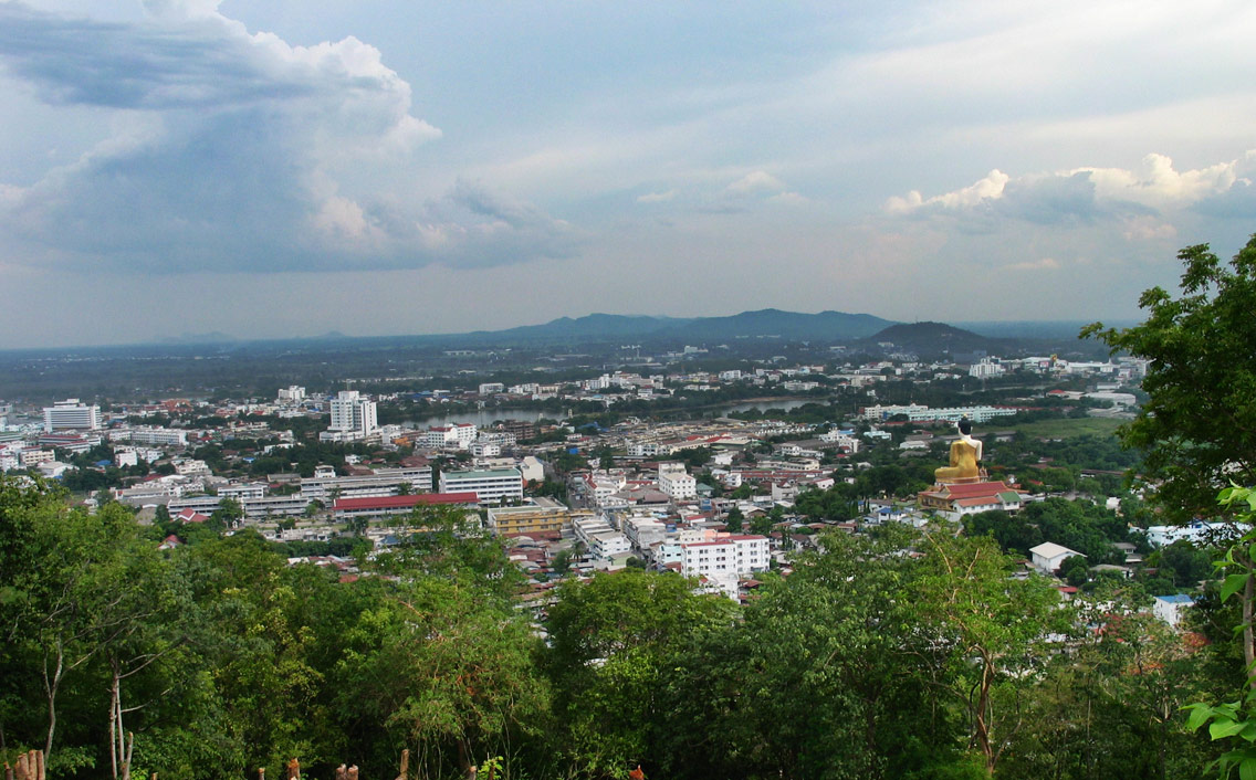 Nakhon Sawan, June 2003